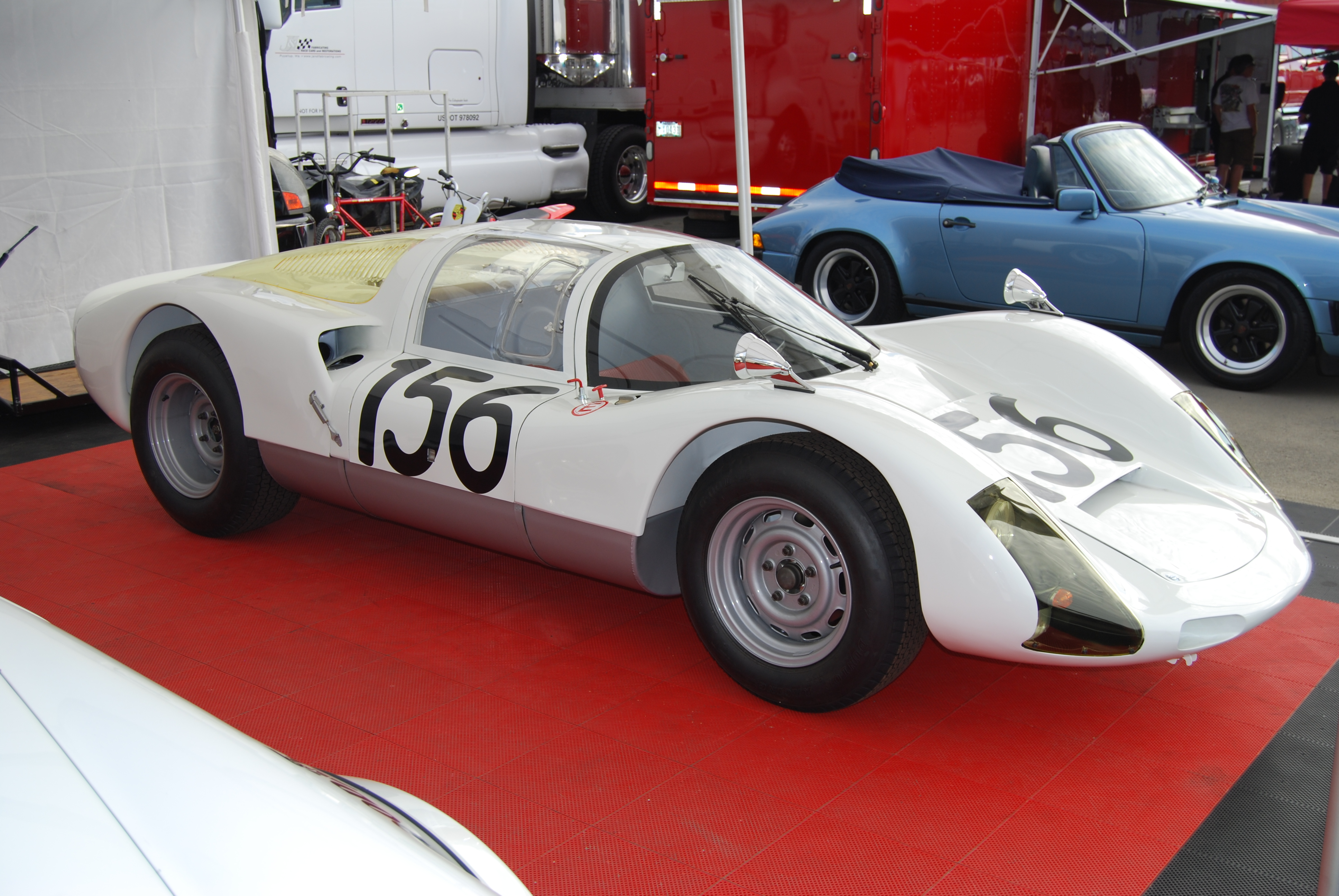 06g7_DSC_0467